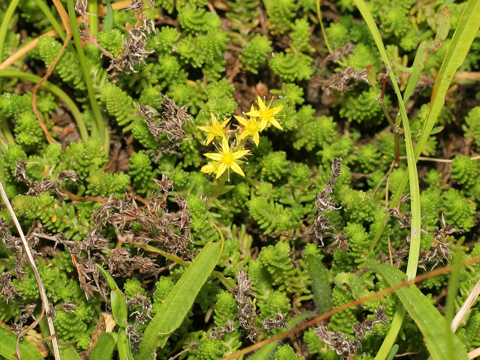 Milder Mauerpfeffer (Sedum sexangulare)